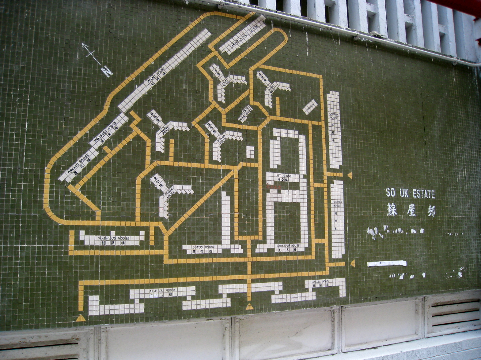 So Uk Estate Mosaic Map 蘇屋邨馬賽克地圖